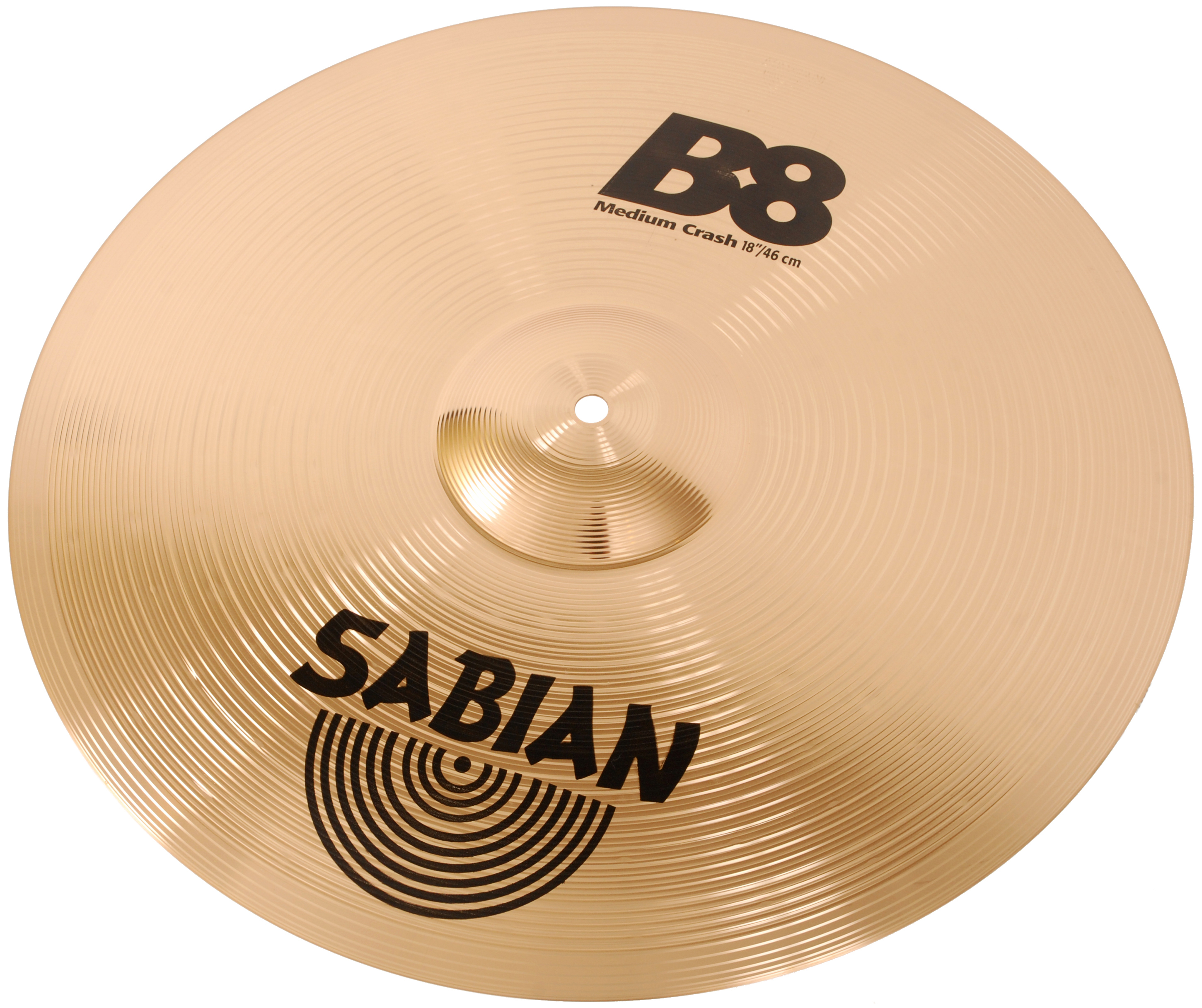 Crash 41808 18" B8 firmy Sabian